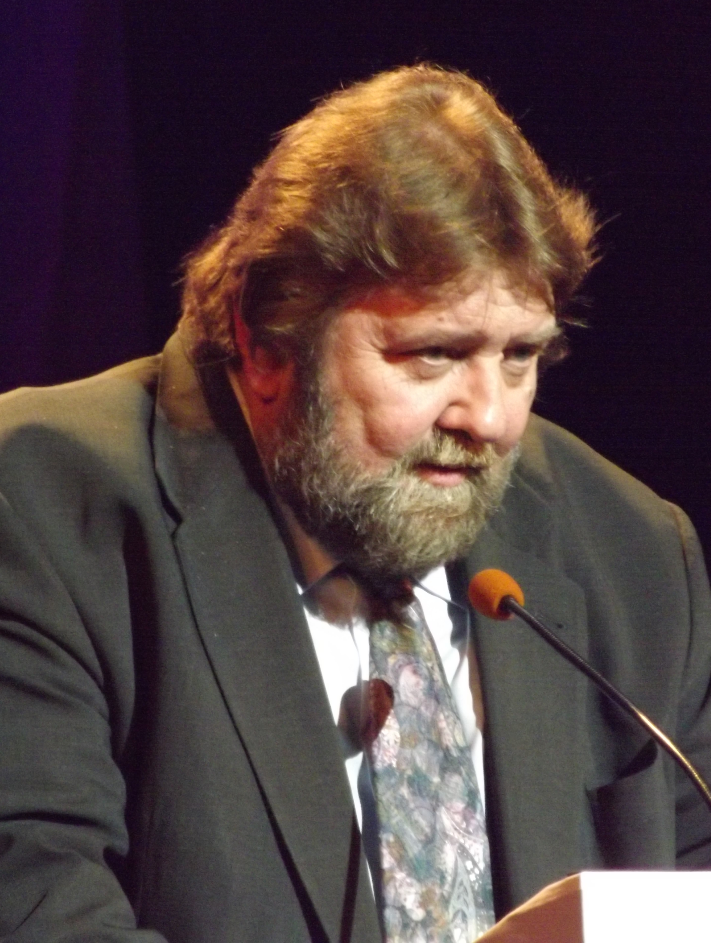 Polityk Stanisław Żółtek podczas II Kongresu Nowej Prawicy 23 marca 2014 r.